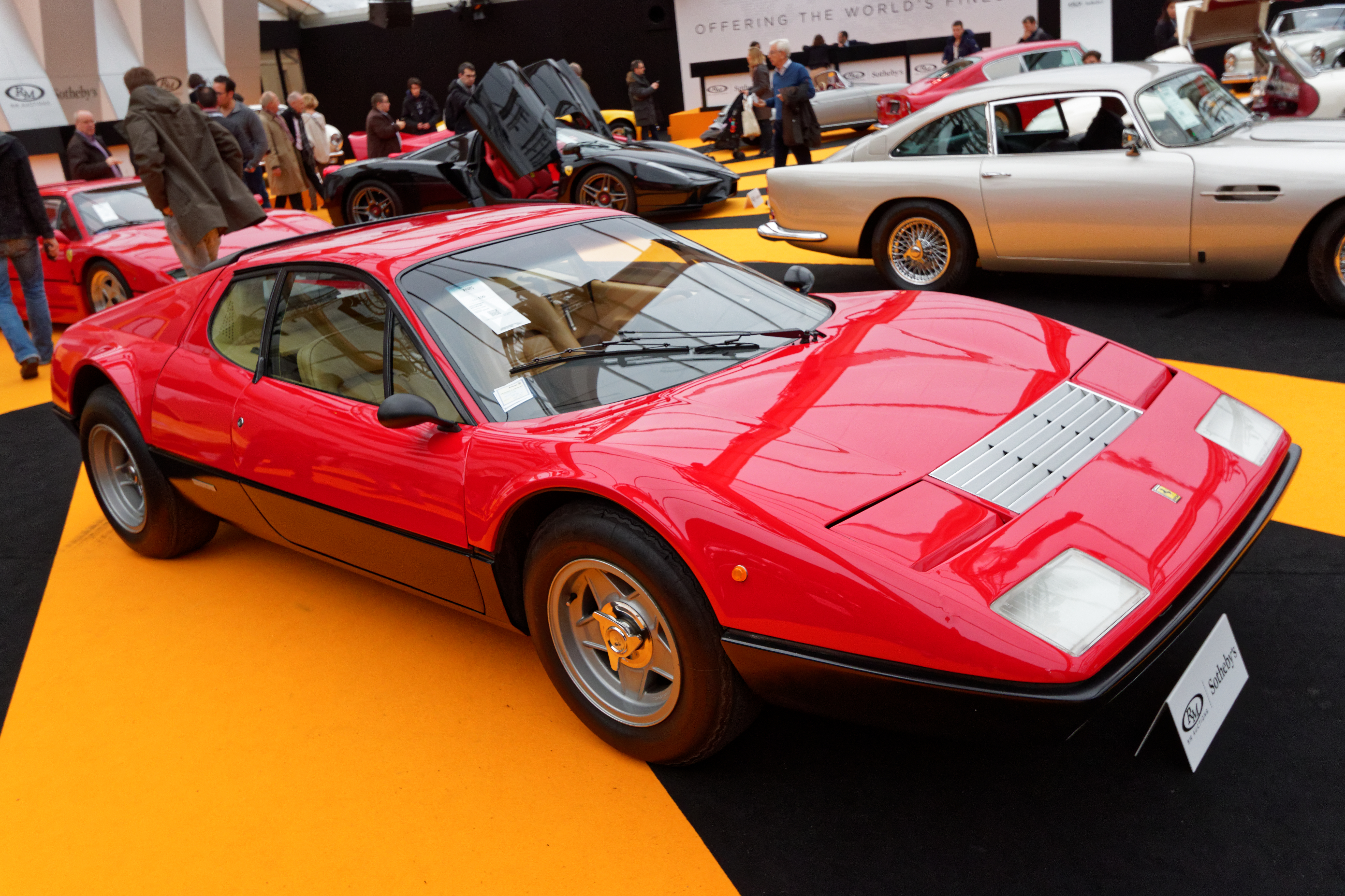 Une Ferrari 356 GT4 BB de 1974 exposée lors de la vente RM Sotheby’s 2016 aux Invalides à Paris.